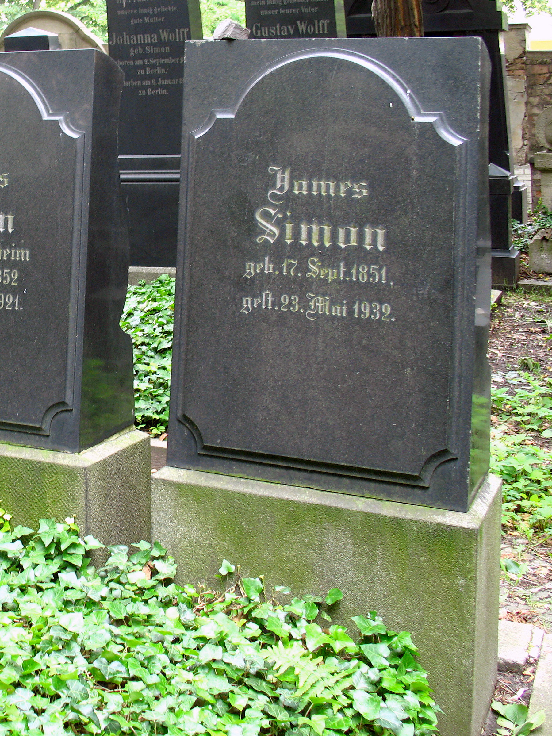 Alter Jüdischer Friedhof, Berlin-Prenzlauer Berg: Grabstein von James Simon; Ehrengrab